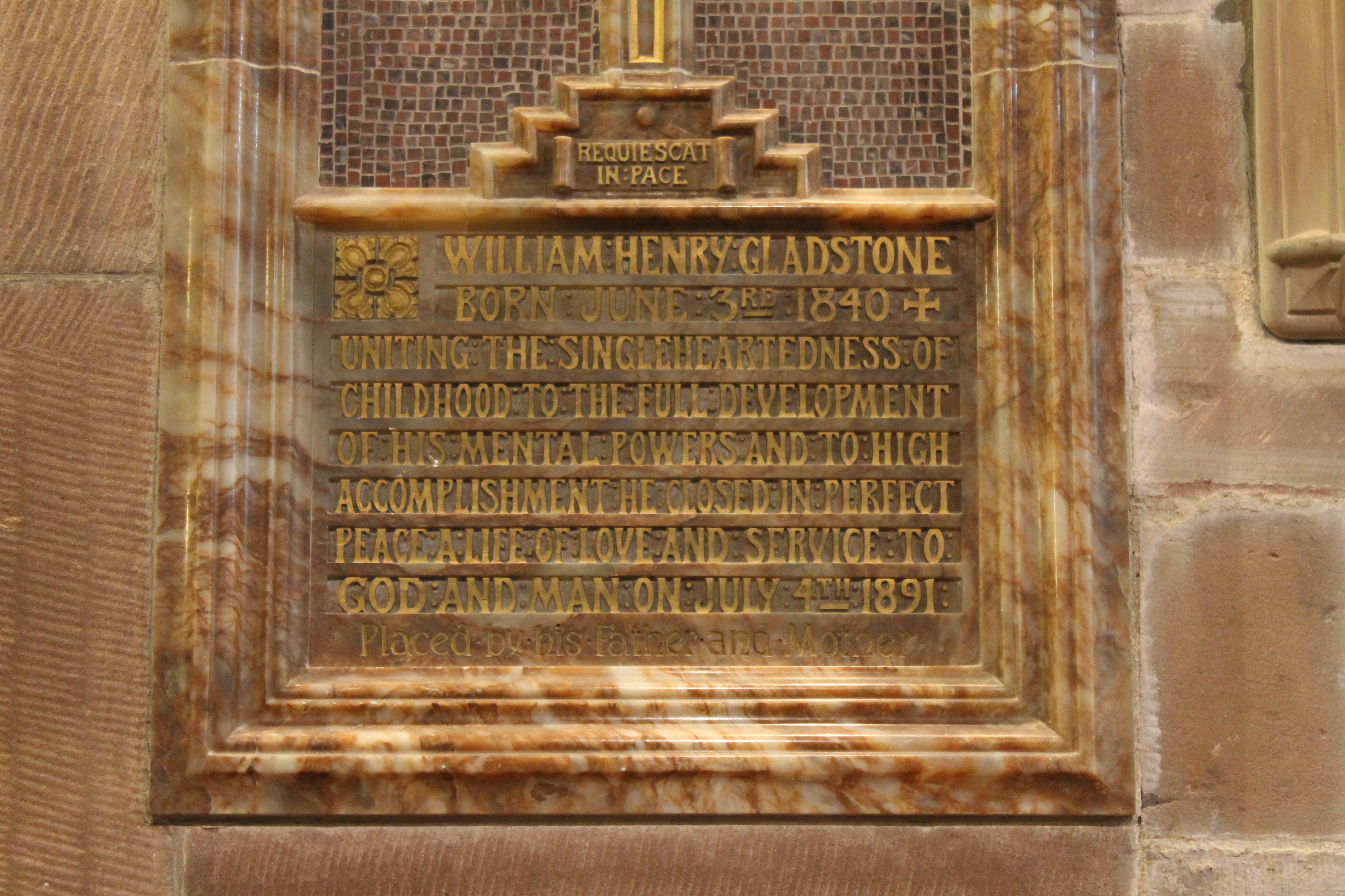 Eglwys Sant Deiniol, Penarlag, sir y Fflint.